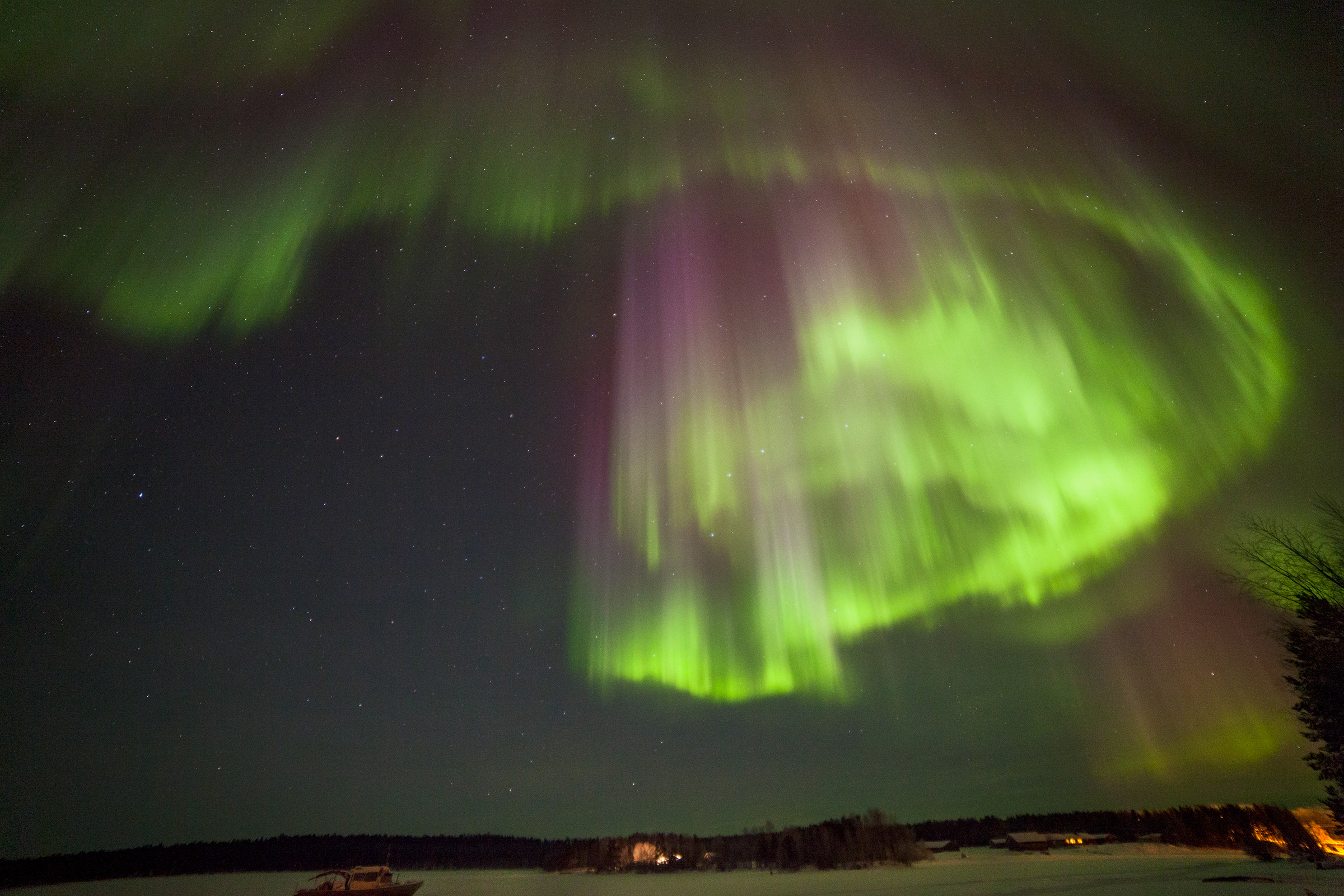 Aурора бореалис, поларна светлина во близина на Езерото Инари